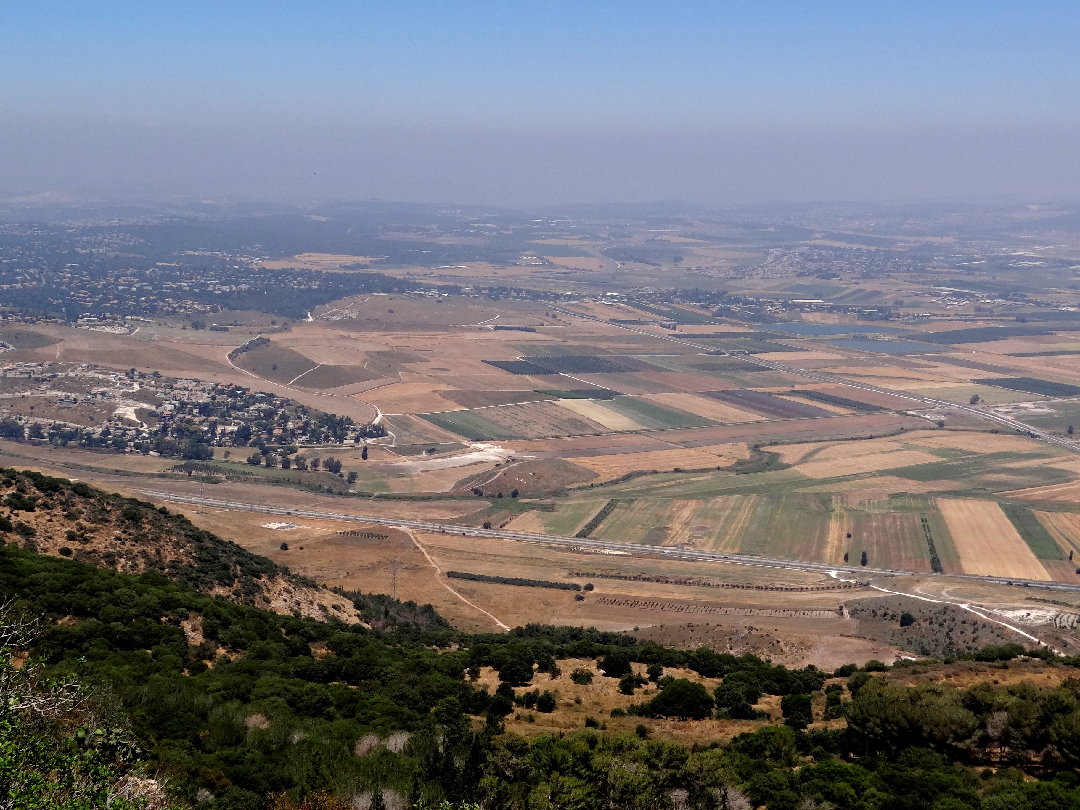 Tel Kashish, Archaeology site on north of Israel תל קשישי אתר ארכאולוגי בעמק יזרעאל קרוב לתל יקנעם, למרגלותיו עובר נחל קישון. מיקומו קרוב לשכונת קריית חרושת בקריית טבעון התל במרכז מימין לבתי קריית חרושת